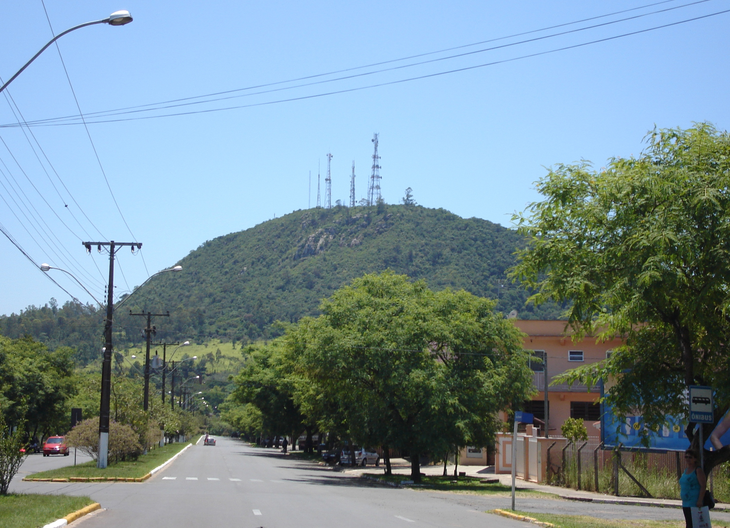 Morro São João, localizado no município de Montenegro, RS, Brasil. O conjunto de montes do qual faz parte o morro São João é conhecido no município como "Gigante de Pedra".